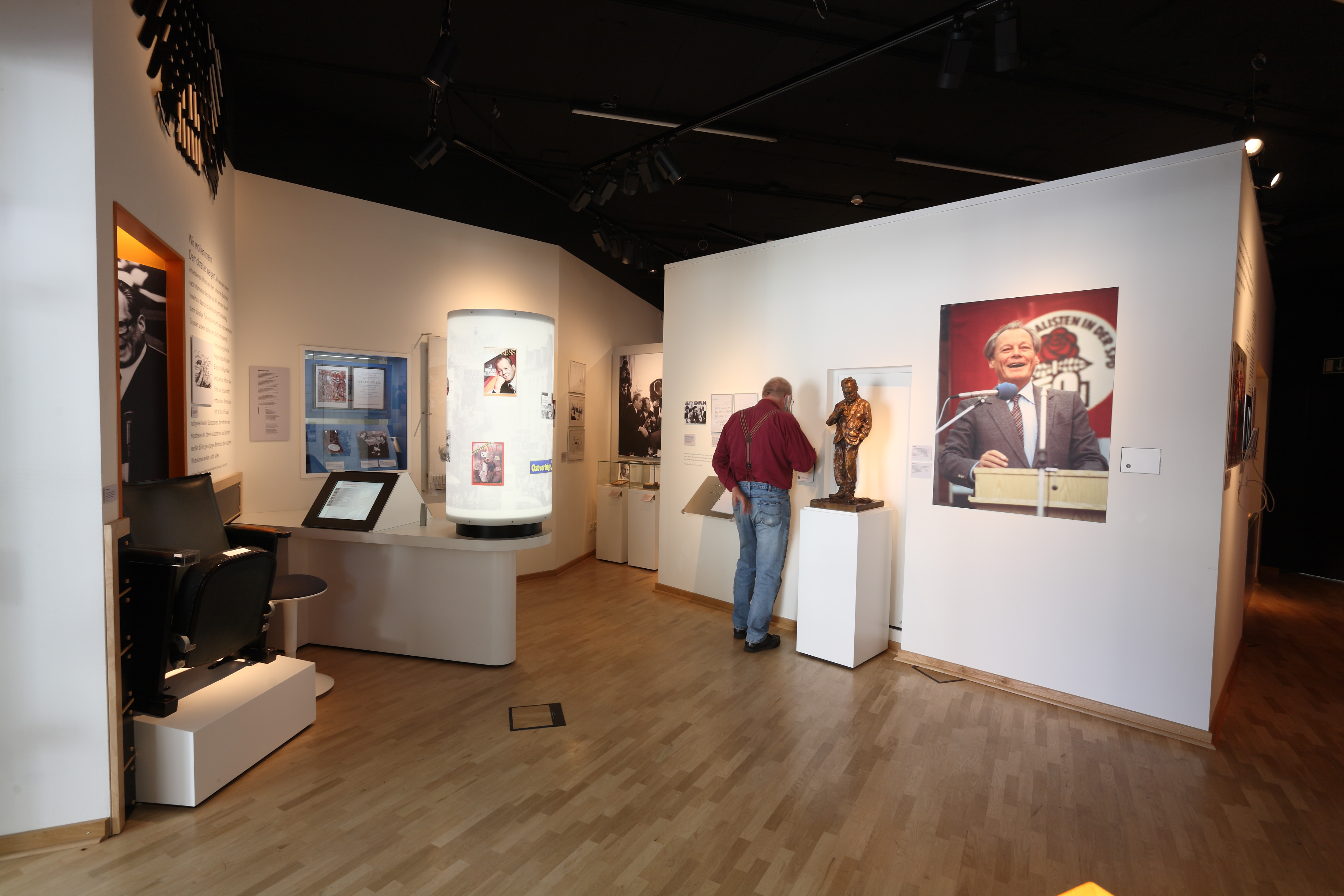 Ein Teil der Dauerausstellung des Willy-Brandt-Forums in Unkel